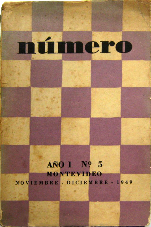 Portada de la primera época de la publicación literaria de Urguay "Número".